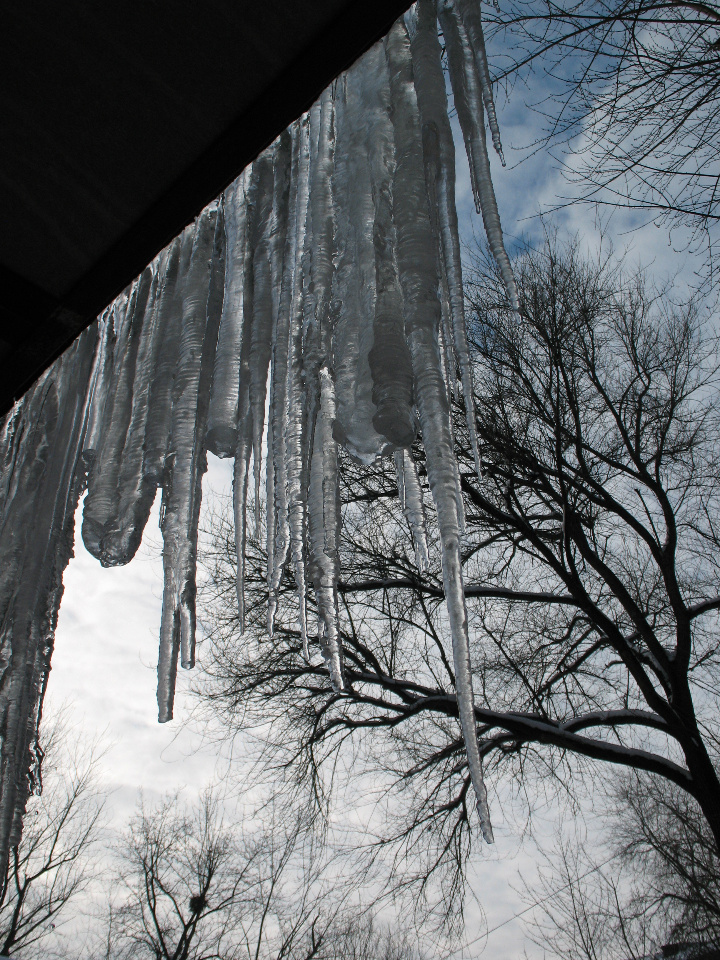 Сосульки-сталактиты длиной более полутора метров на крыльце дома, город Харьков, февраль 2010 года